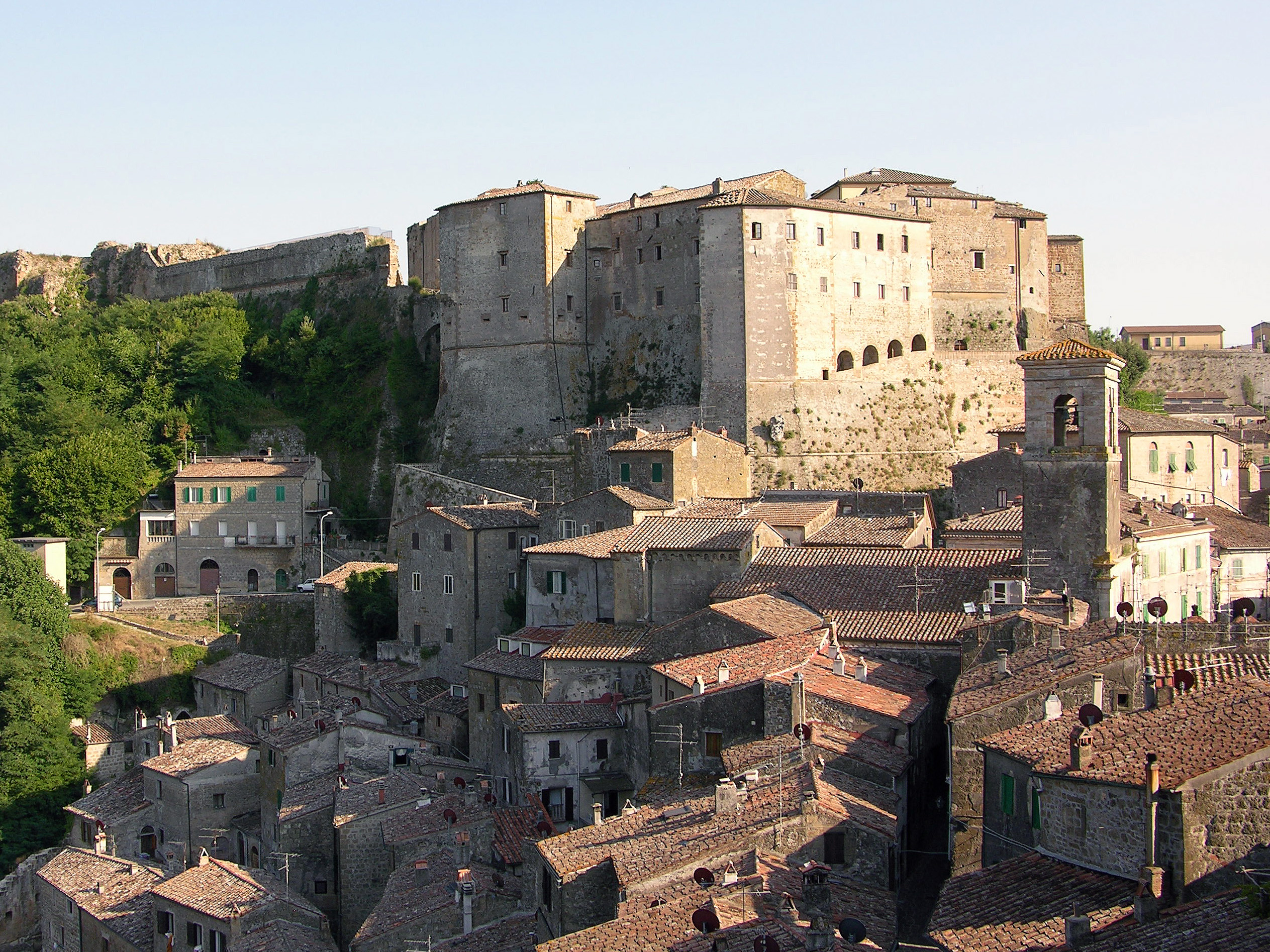 Scorcio di Sorano, sullo sfondo la Fortezza Orsini.